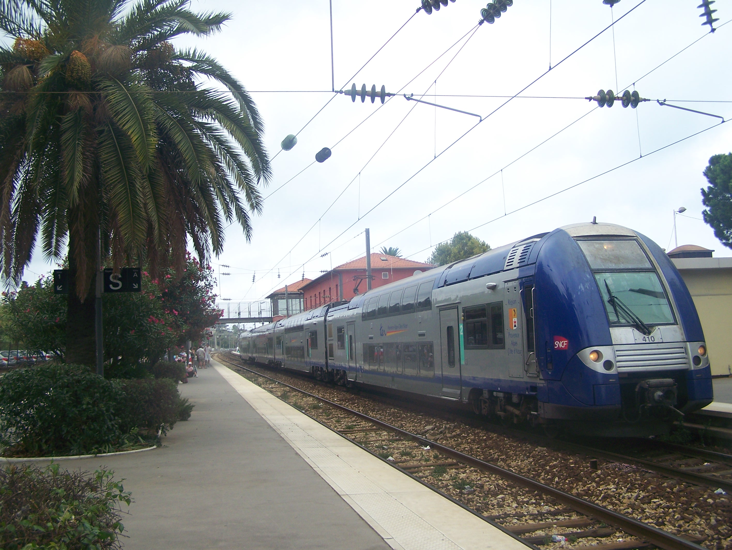 Une rame TER 2N NG entrant en gare d'Antibes, le 16/08/06.